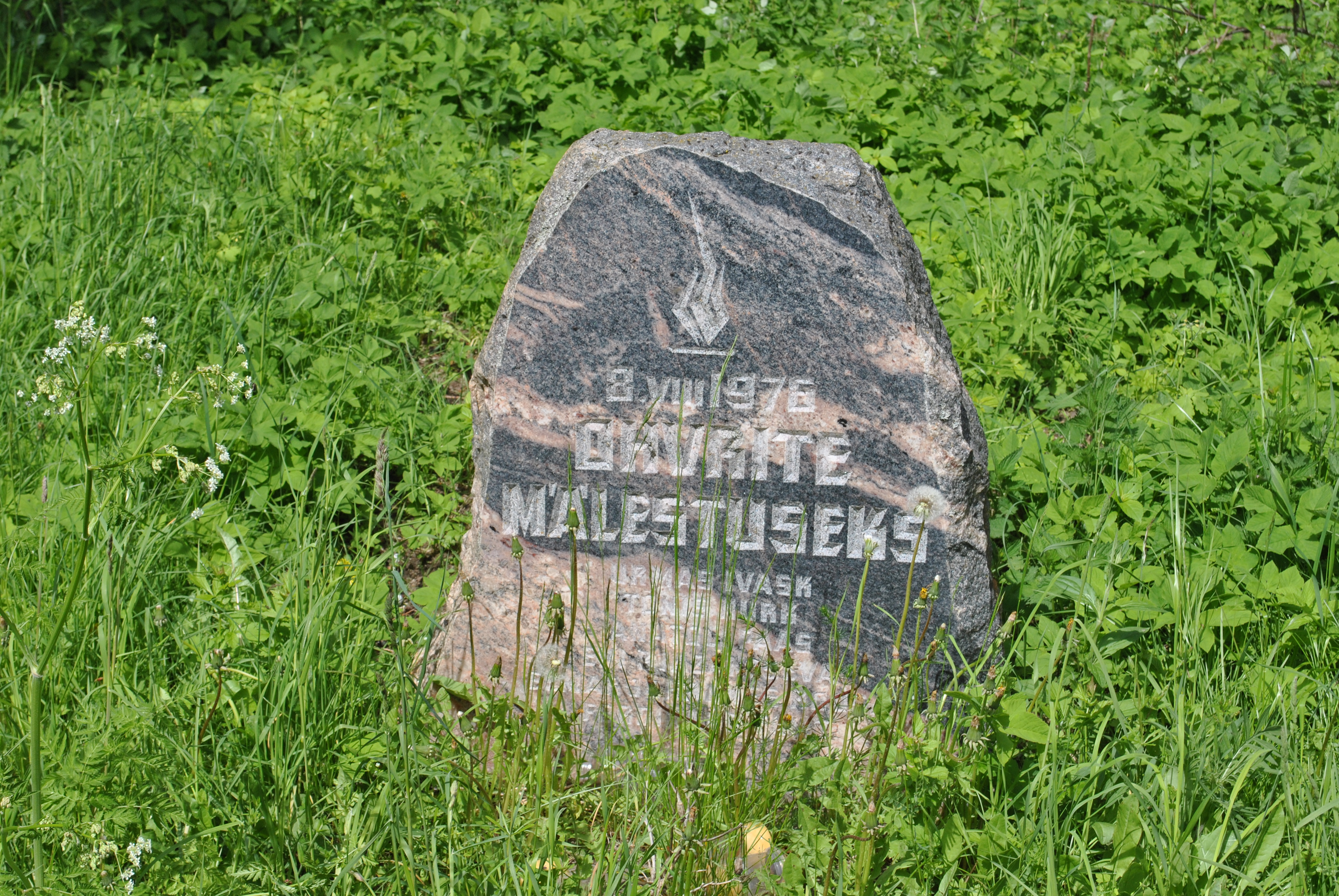 Letipea tulistamisohvrite mälestuskivi